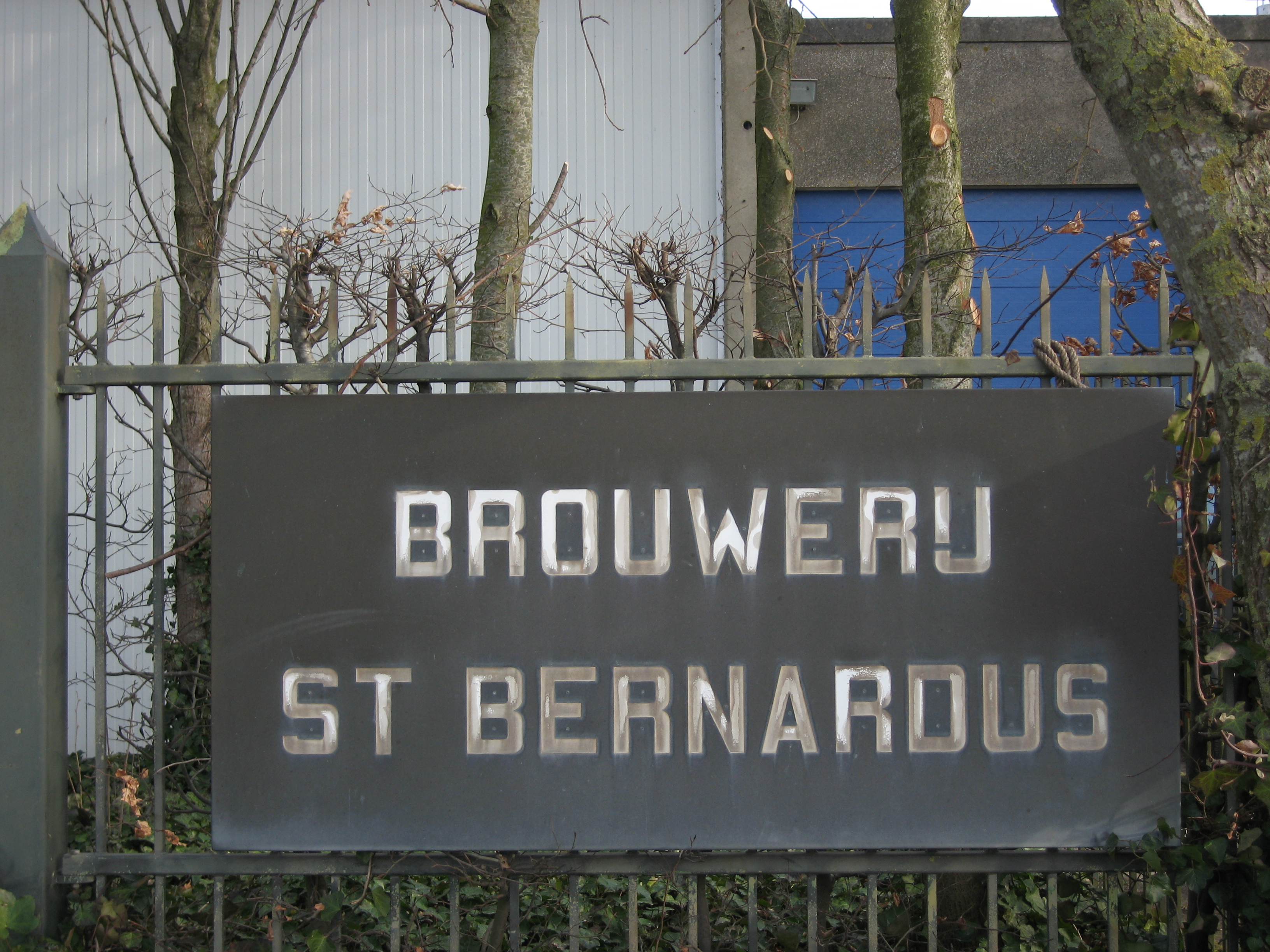 Brouwerij St Bernardus.